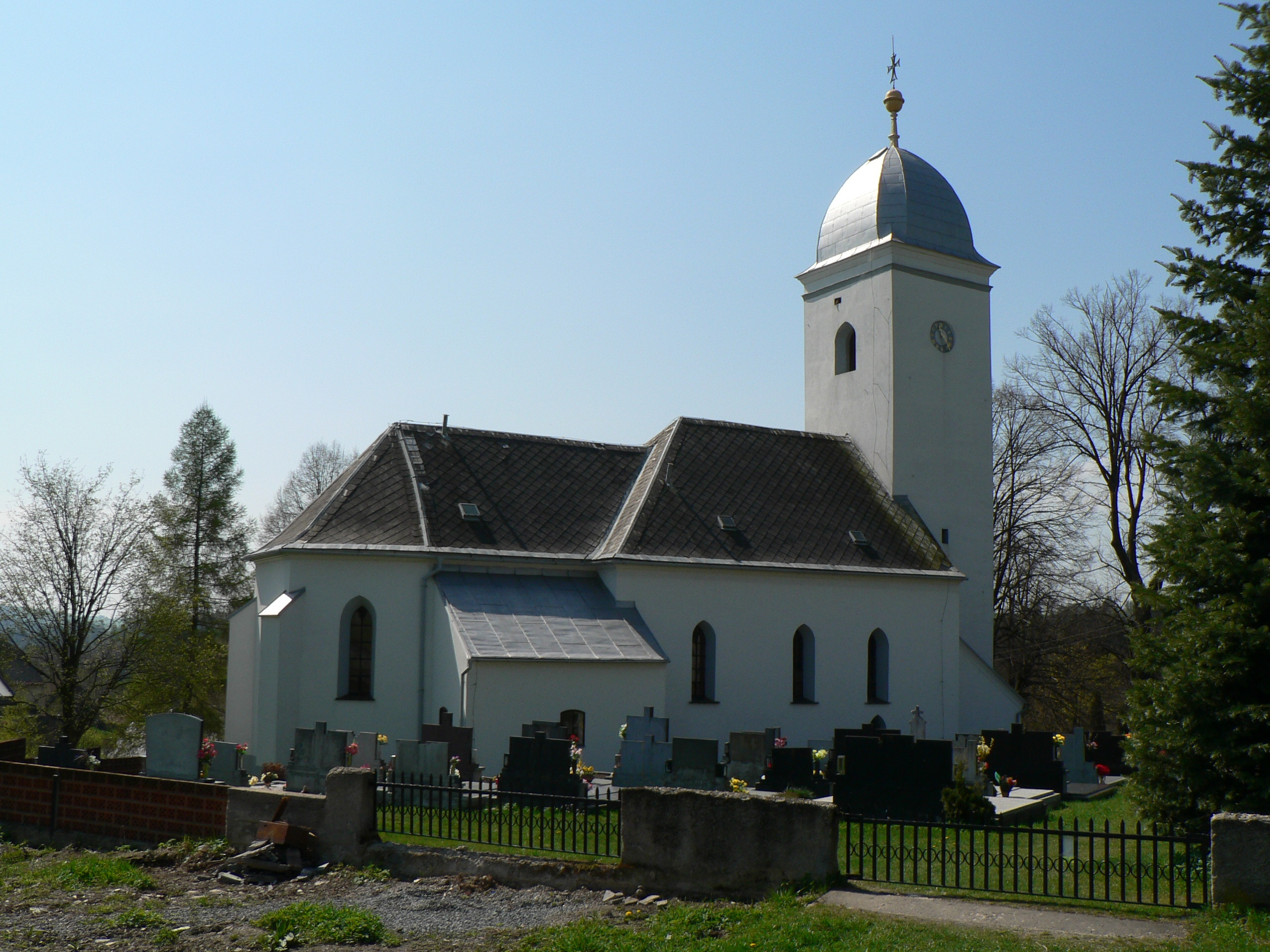 Kostel Nejsvětější Trojice (Velká Štáhle)